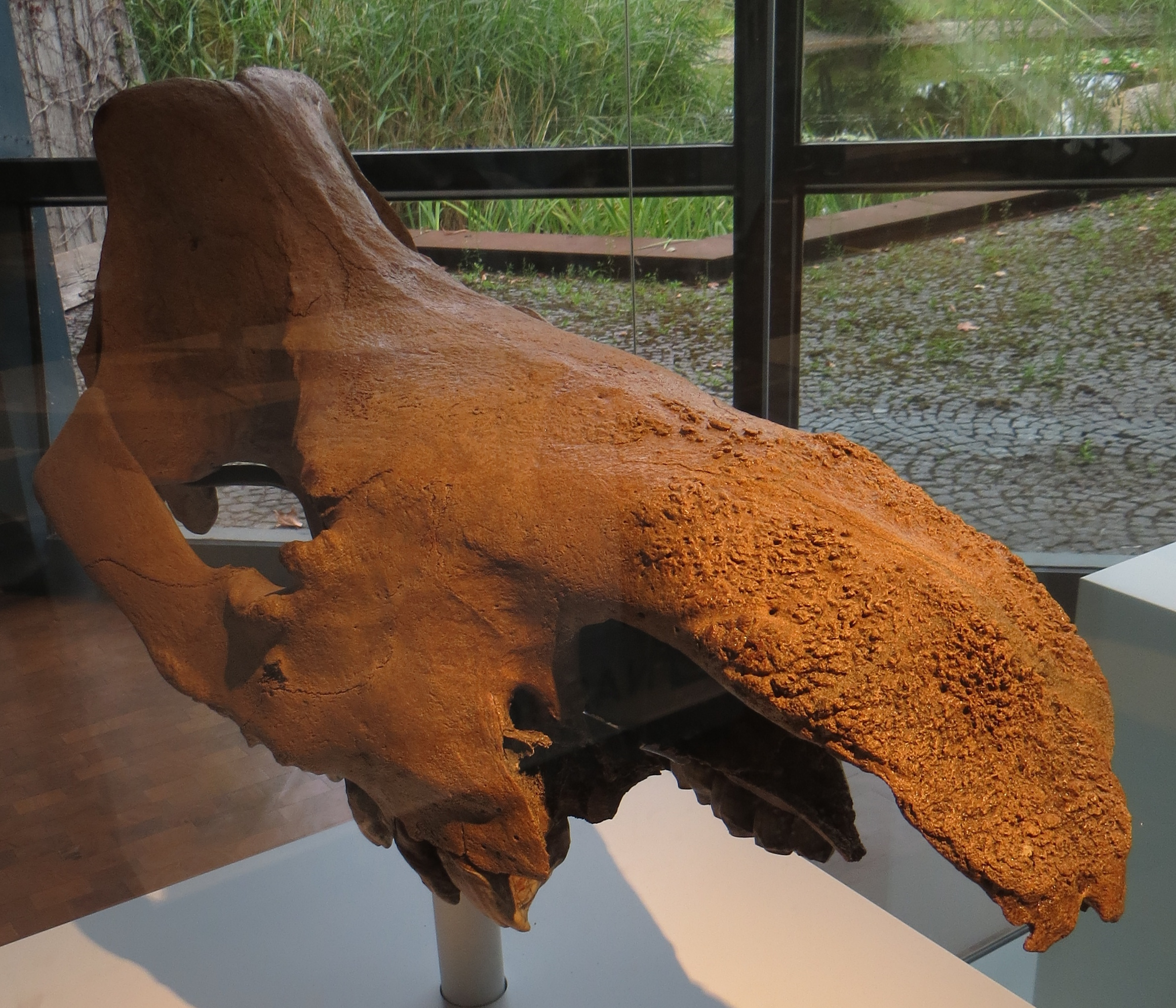 Fossil of Stephanorhinus- Took the picture at Museum am Lowentor, Stuttgart